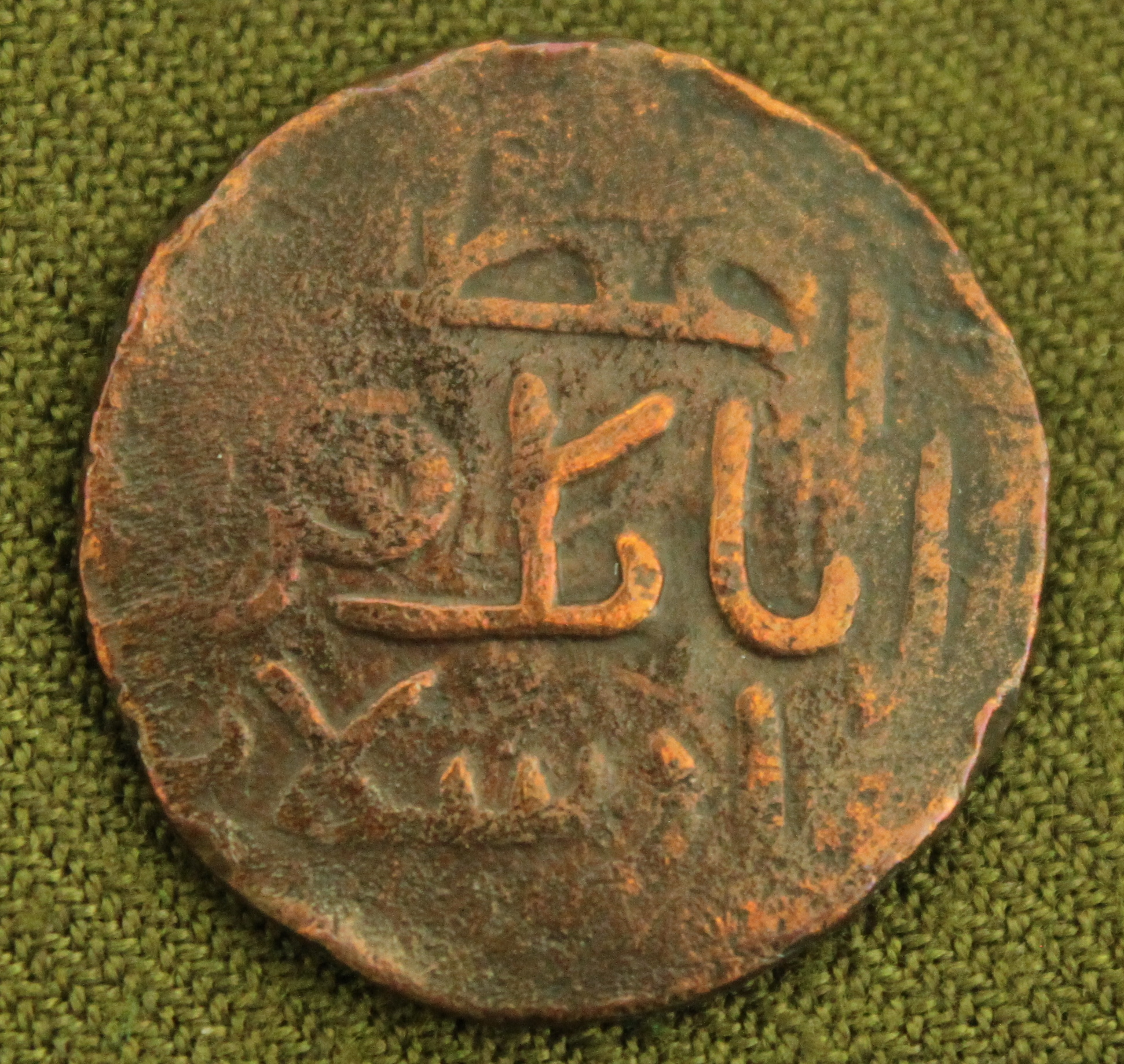 Атабеки Азербайджана Эльдагизы, Кызыл Арслан, медный дирхам, 1186 год.